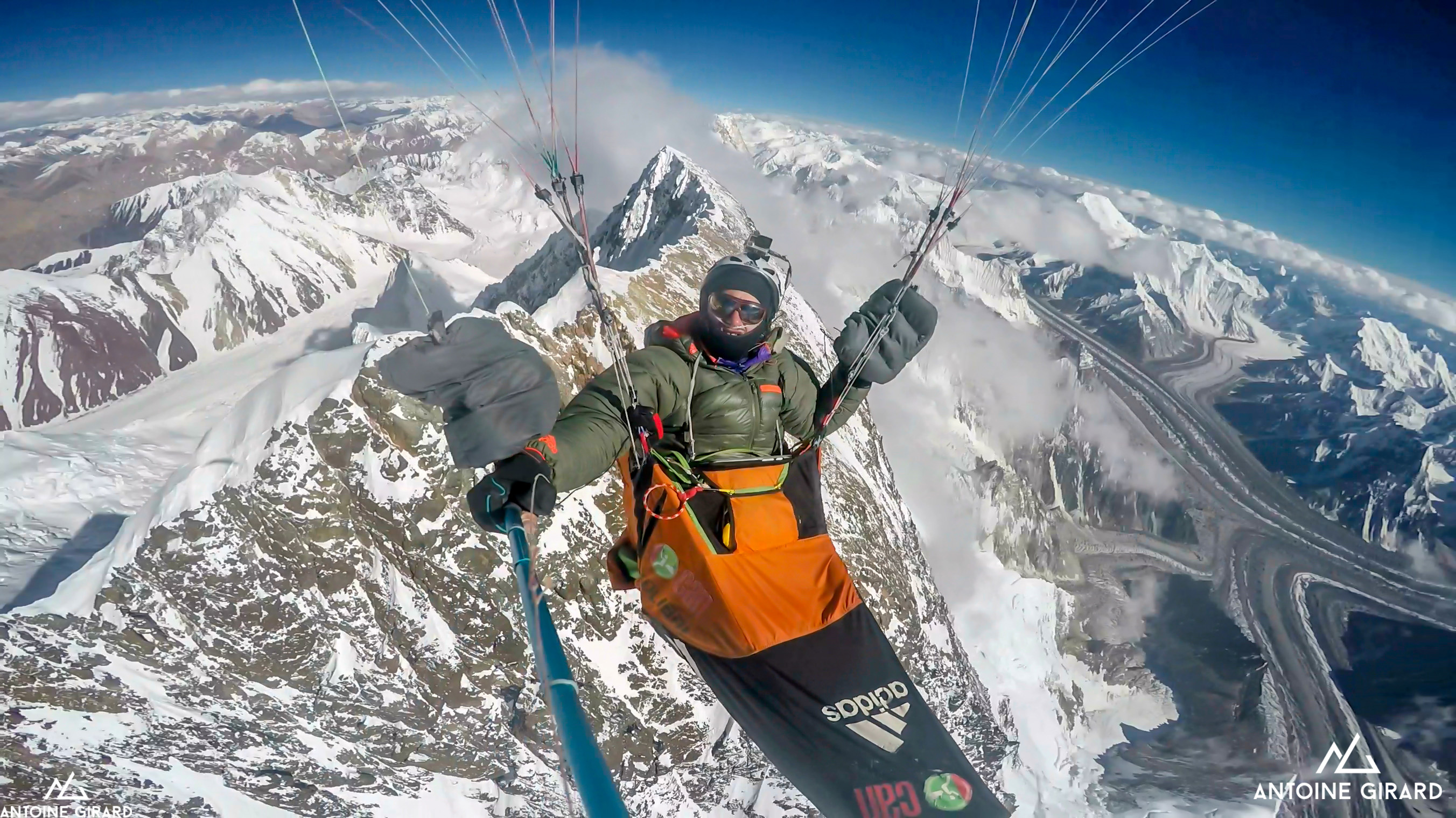 Photo à l'altitude de 8157m au dessus du sommet du Broad Peak à 8051m